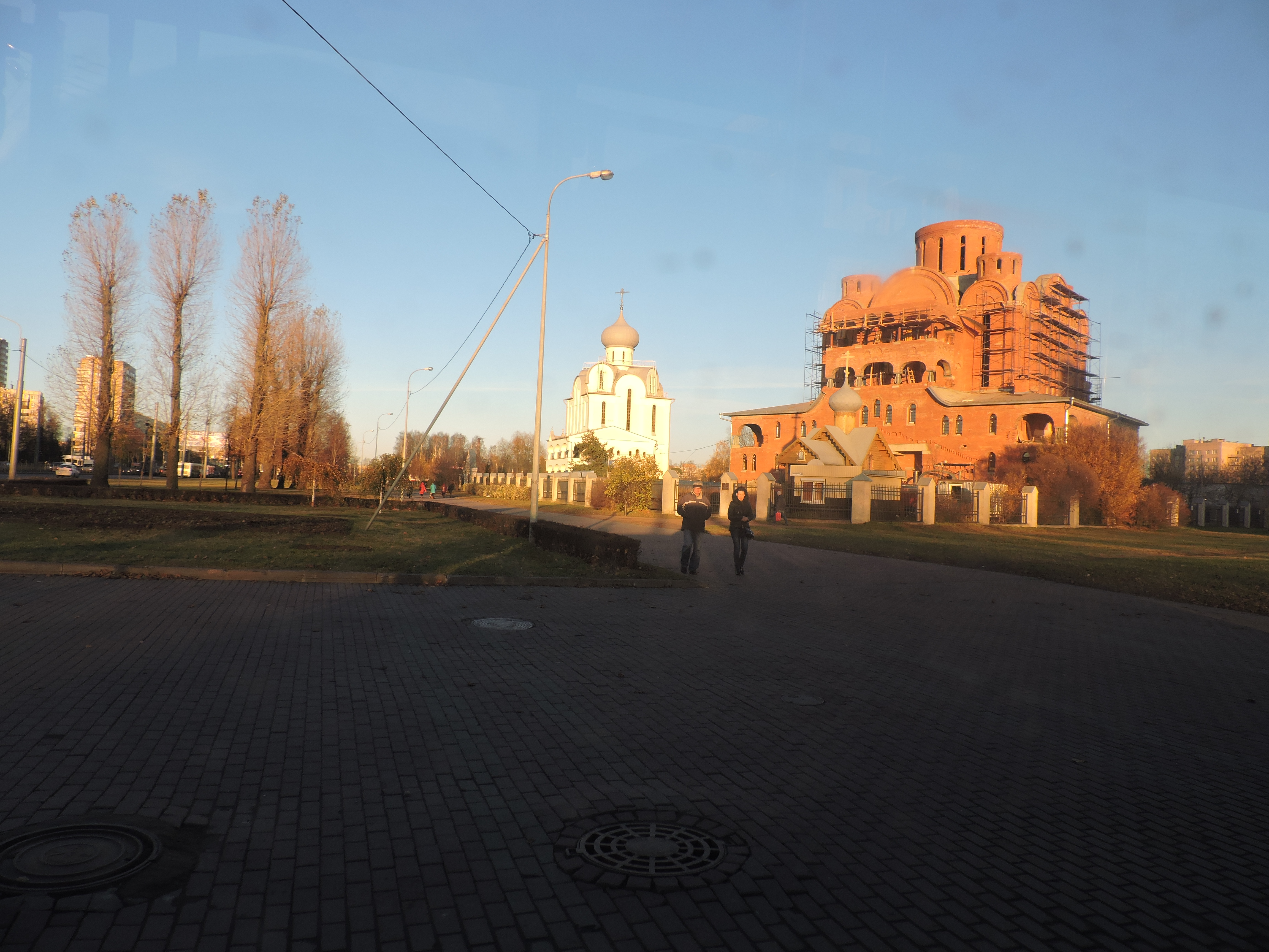 Храмы на Пискарёвском